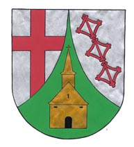 Wappen von Mermuth